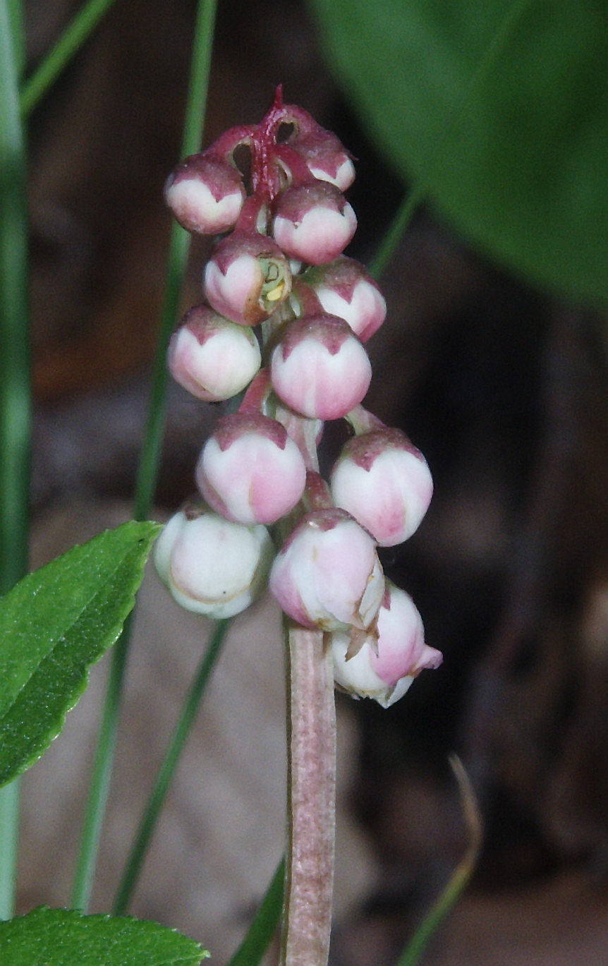 Pyrola minor, Virngrund, Germany